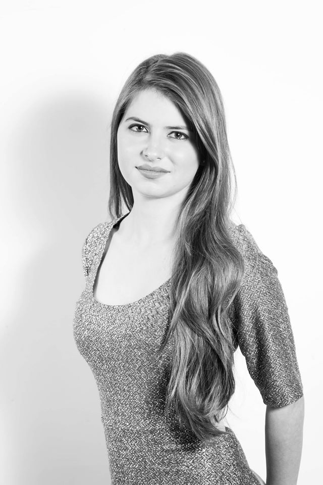 Daniela Aedo actuelmente